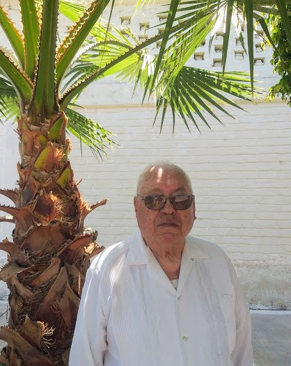 Profesor Jaramillo actualmente en Jalisco